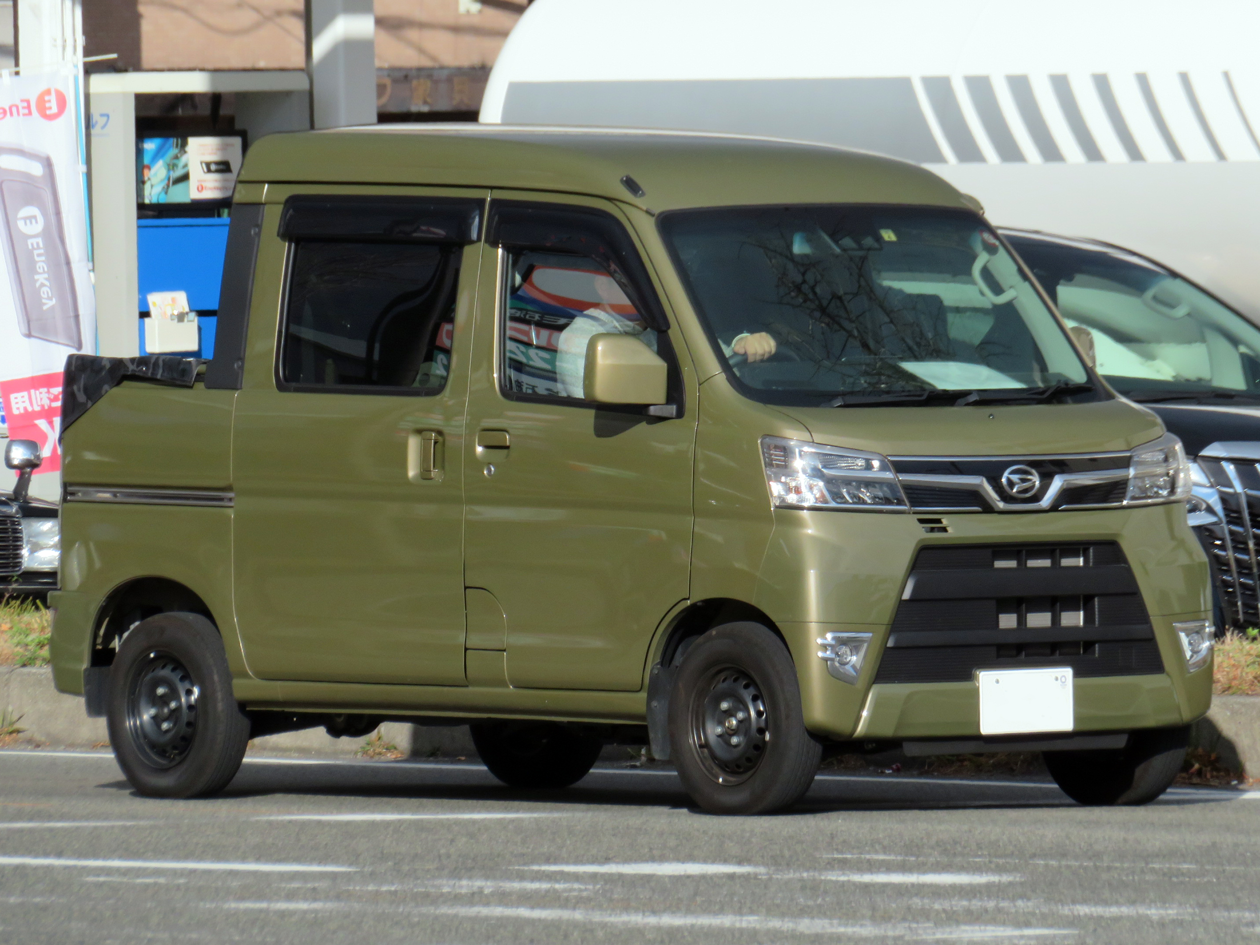 EBD-S321W-ZQRF型ダイハツ・ハイゼットデッキバンL"SA III"2WDを撮影。